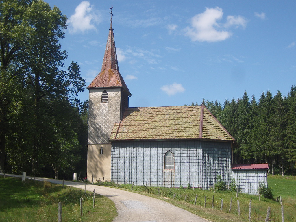 chapelle Saint-Théodule (Labergement-Sainte-Marie - Doubs)